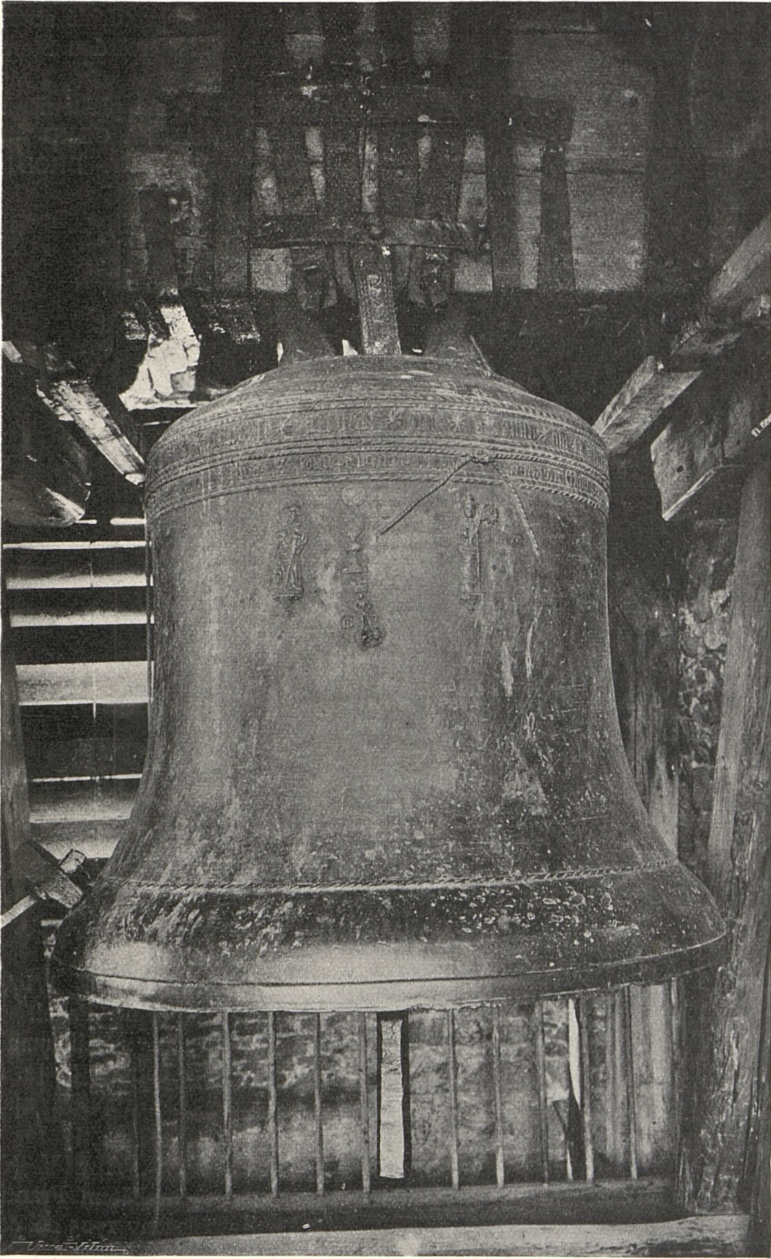 Zvon v Benešově Původní popisek: „Obr. 31. Benešov. Hořejší zvonice. Zvon z roku 1483.“